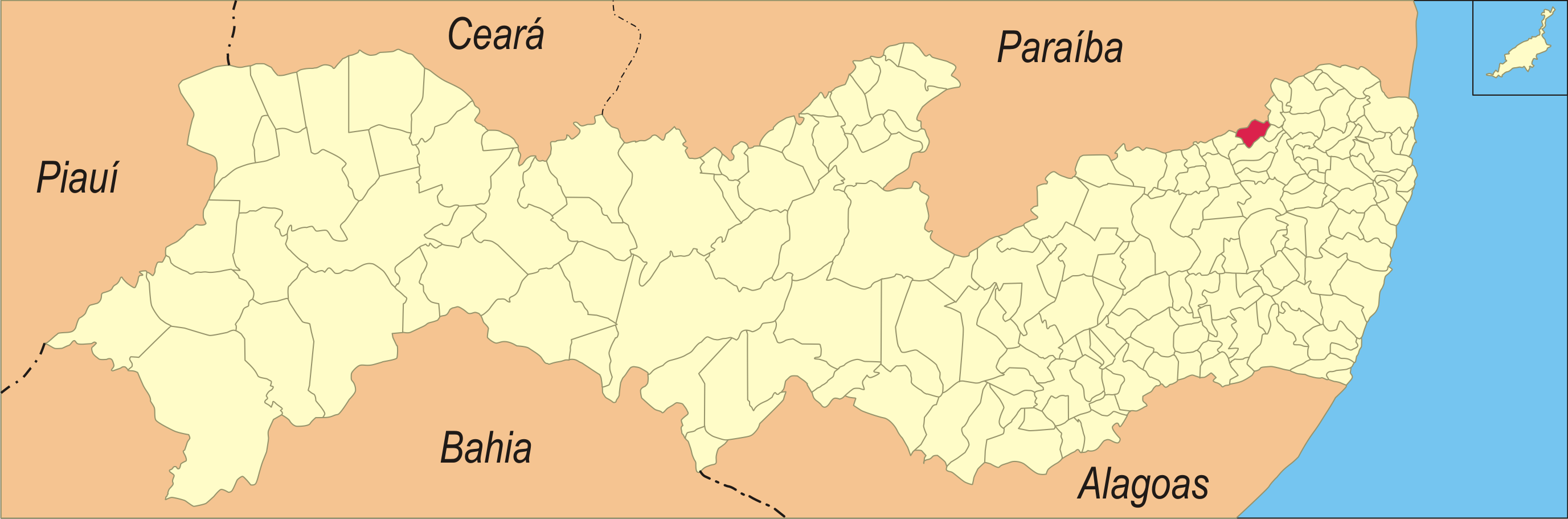 Localização da cidade em Pernambuco